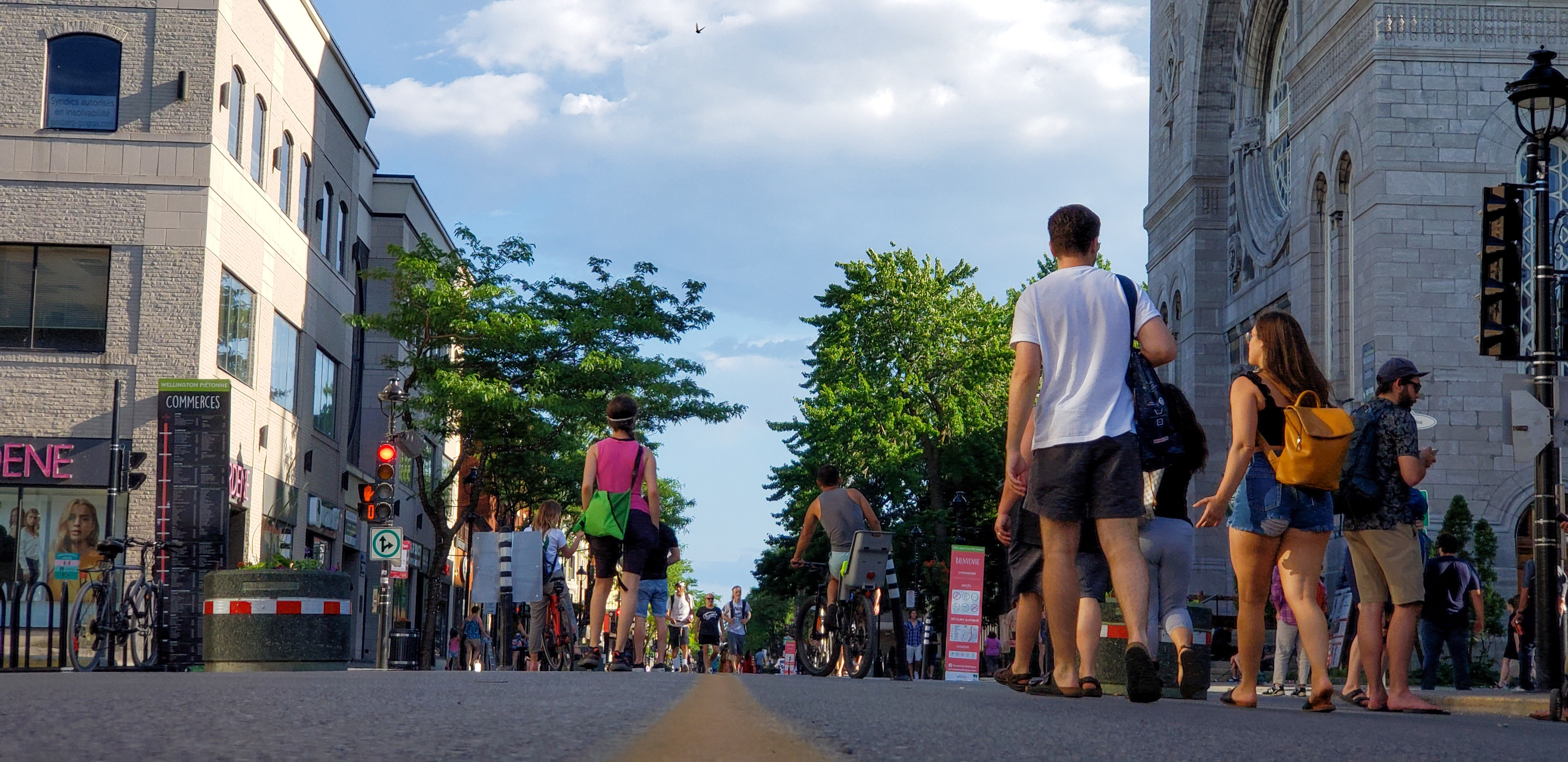 Photo prise le 19 juin 2020 à Verdun lors de la pandémie de la Covid-19. Contetxe : Lors de la saison estivale 2020, plusieurs rues montréalaises ont été exceptionnellement piétonnisées tout au long de l'été par l'administration Plante. Ceci afin de permettre aux citoyens de garder une distance minimale de 2 mètres entre eux et ainsi diminuer les risques de contagion. Le cas ci-joint de la rue Wellington fut décrété par la marie de la ville de Verdun (entité faisant partie de l'île de Montréal).